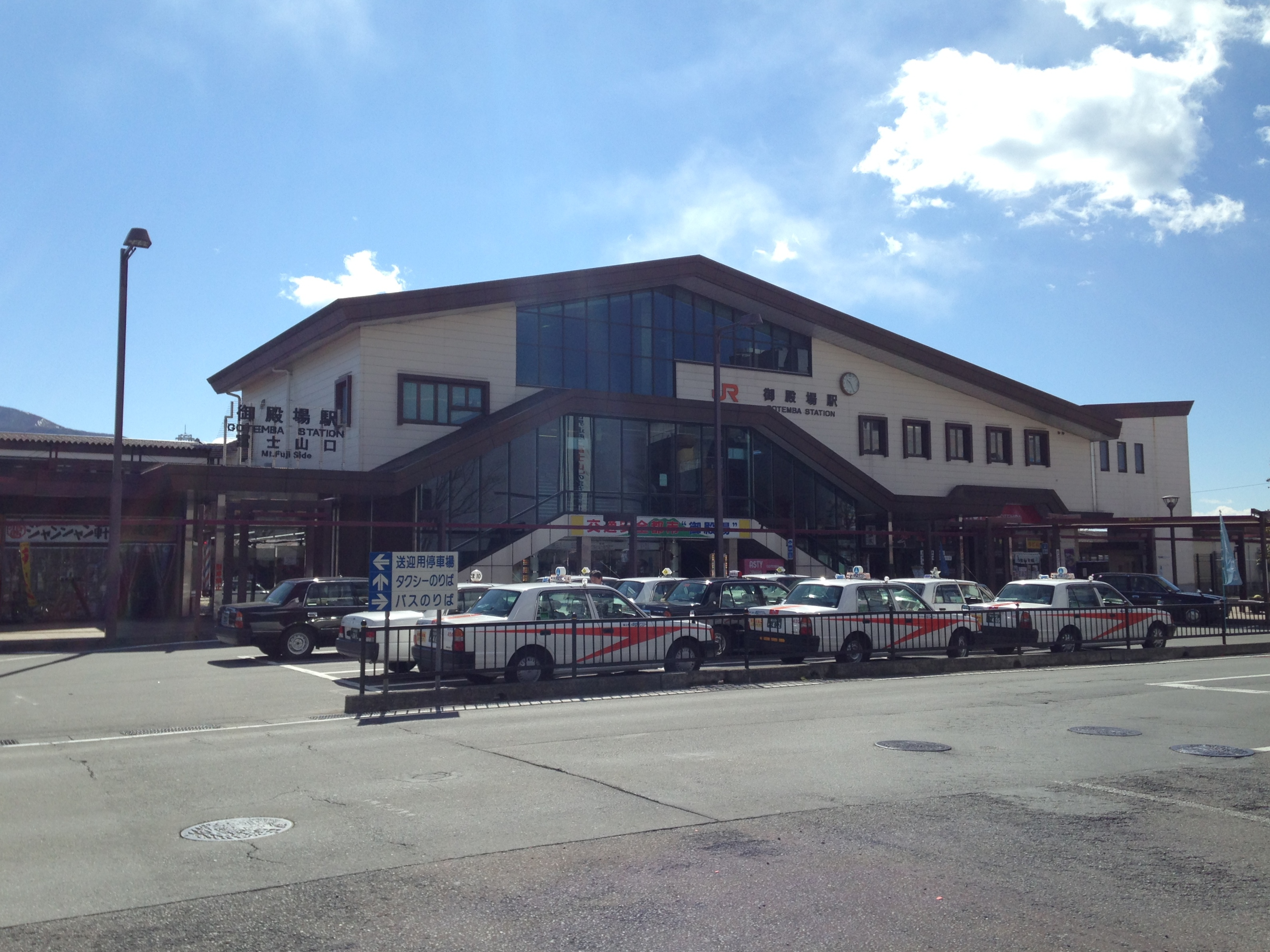 御殿場駅富士山口